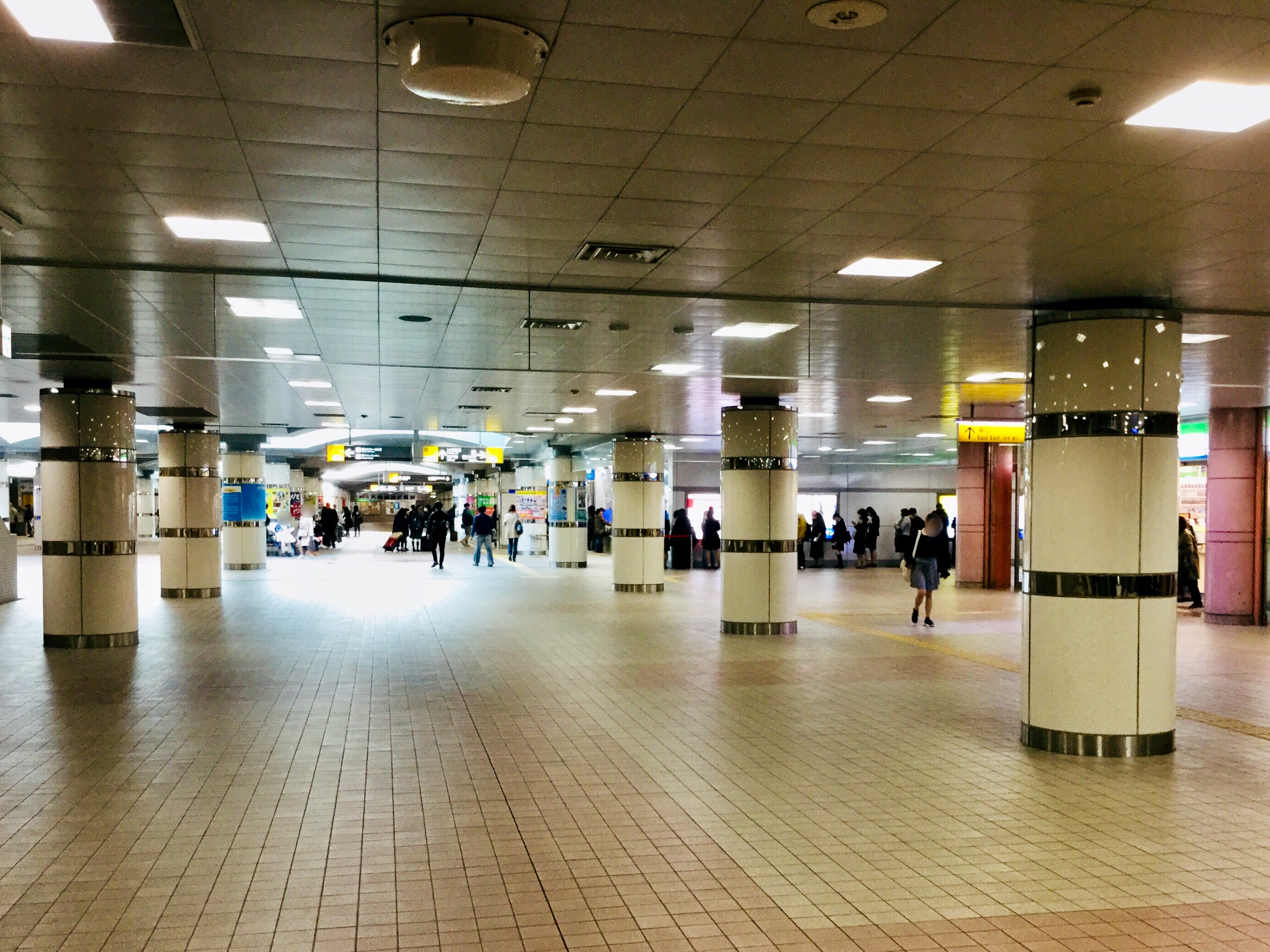 湘南台駅地下通路